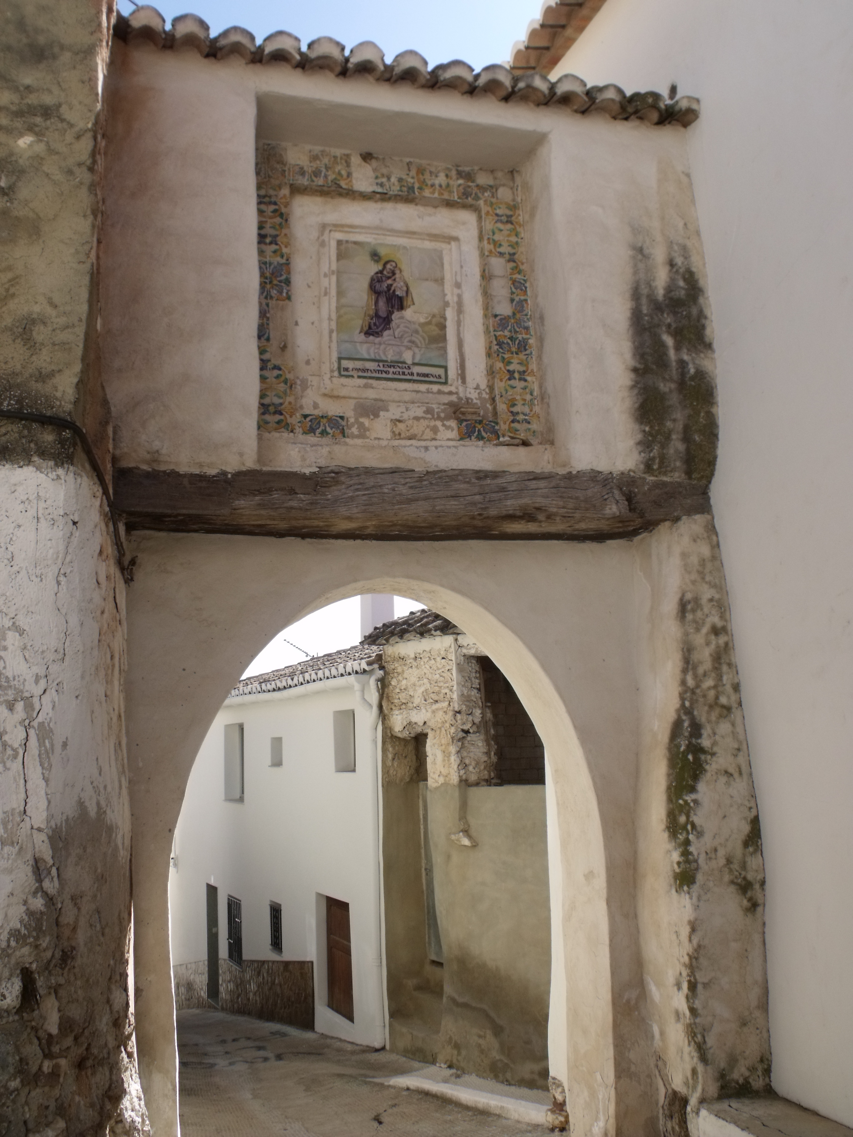 Vistas del Portal de los Santos, san Roque y san Cristóbal